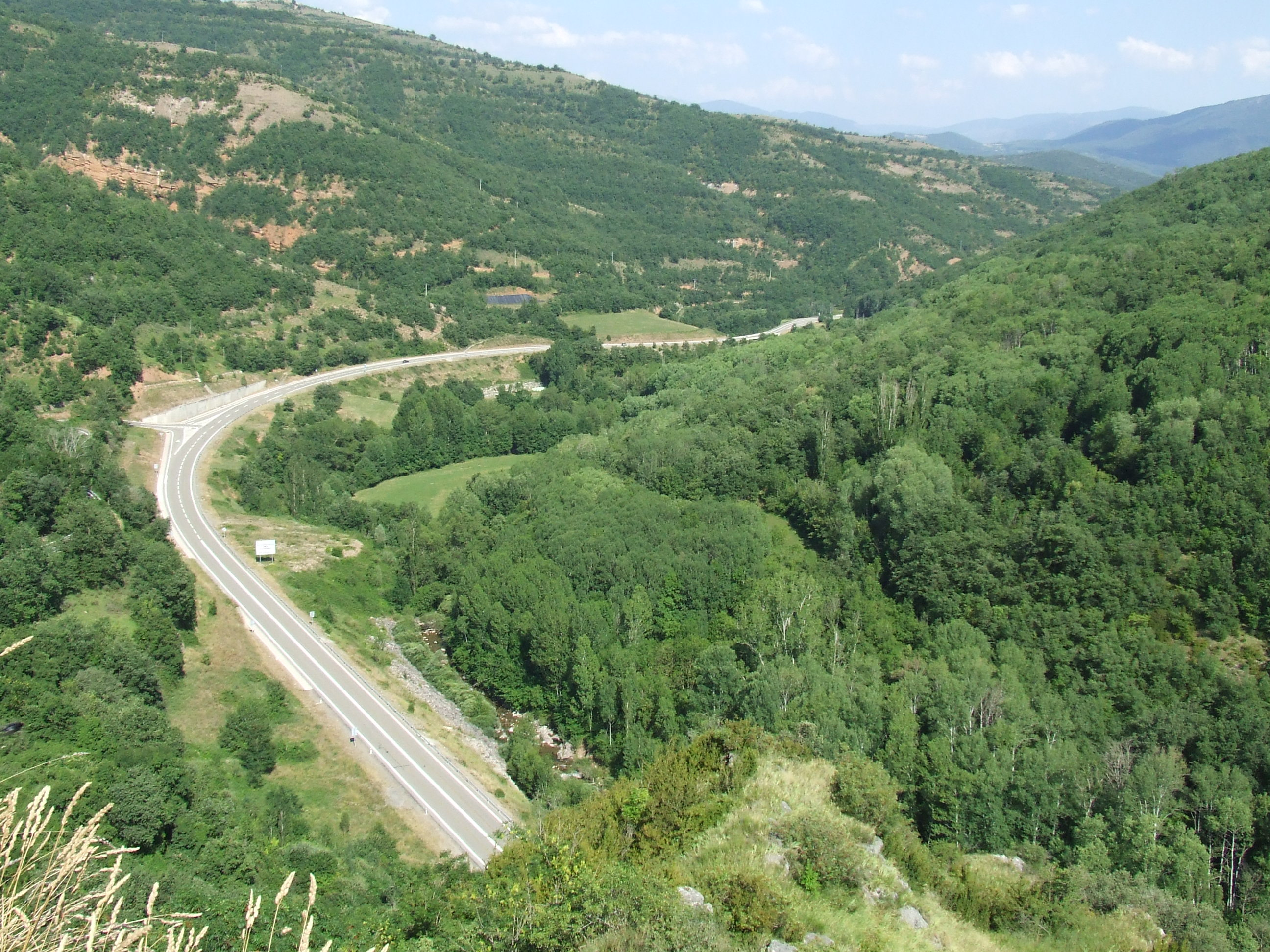 La N-260, a Sarroca de Bellera (Pallars Jussà)